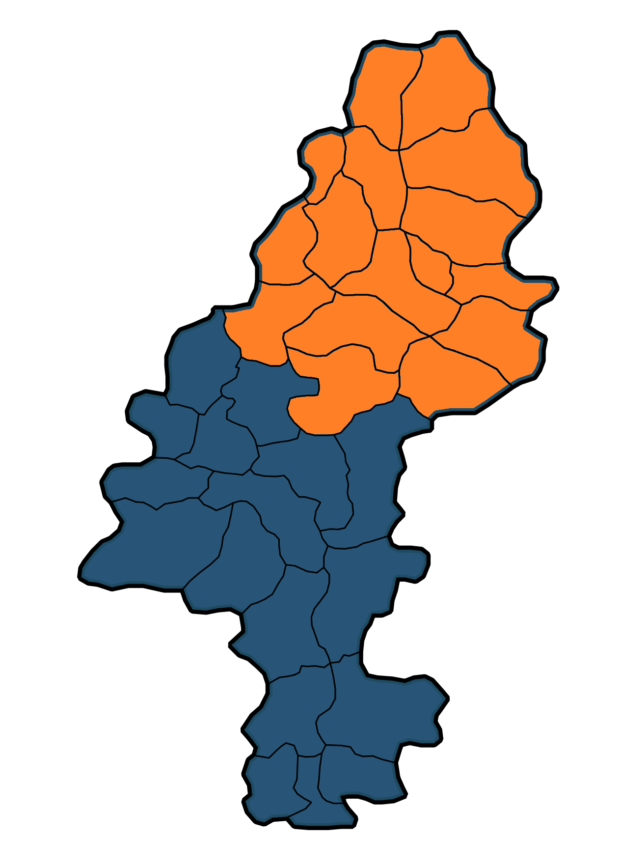 Mapa rejonu włocławskiego diecezji włocławskiej